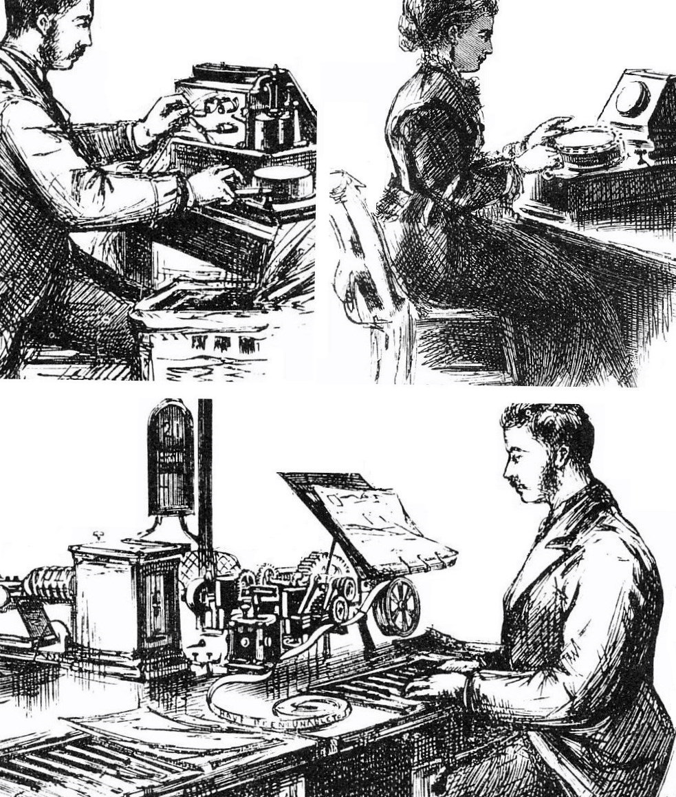 十九世紀前半の有線電信における通信士